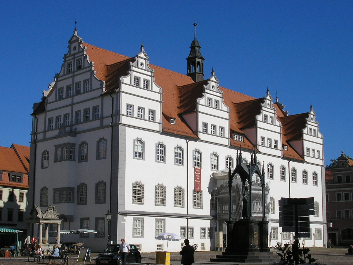 Rathaus von Wittenberg.